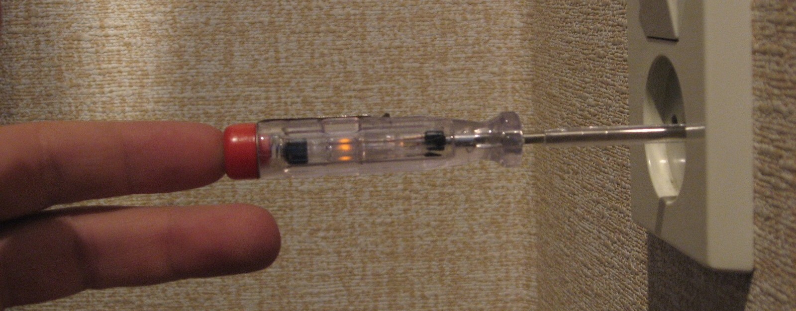 Spanningzoeker met neonlampje. In de spanningzoeker beperkt een weerstand de stroom tot 0.01 mA.